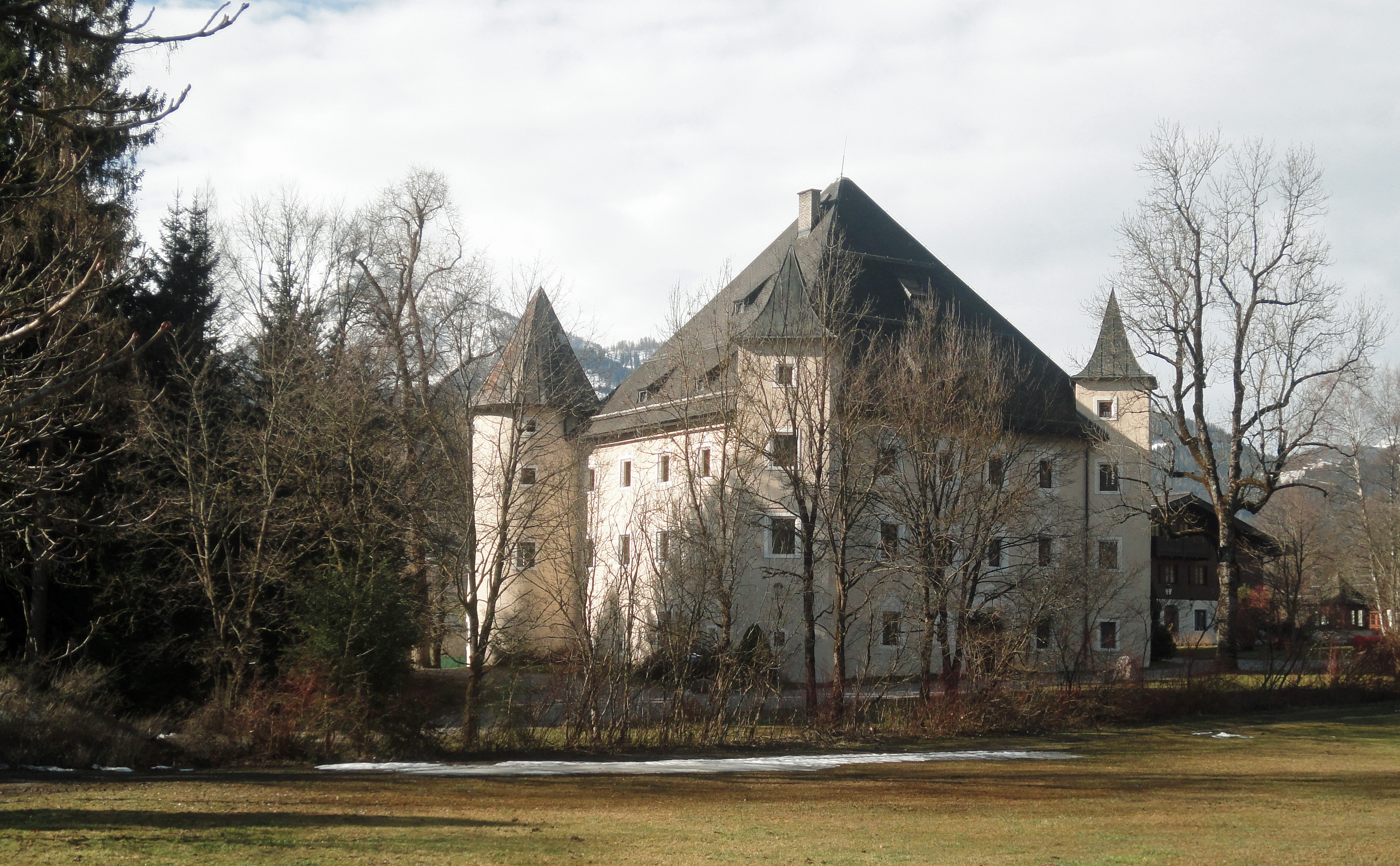 Das denkmalgeschützte Schloss Tandalier in Radstadt.